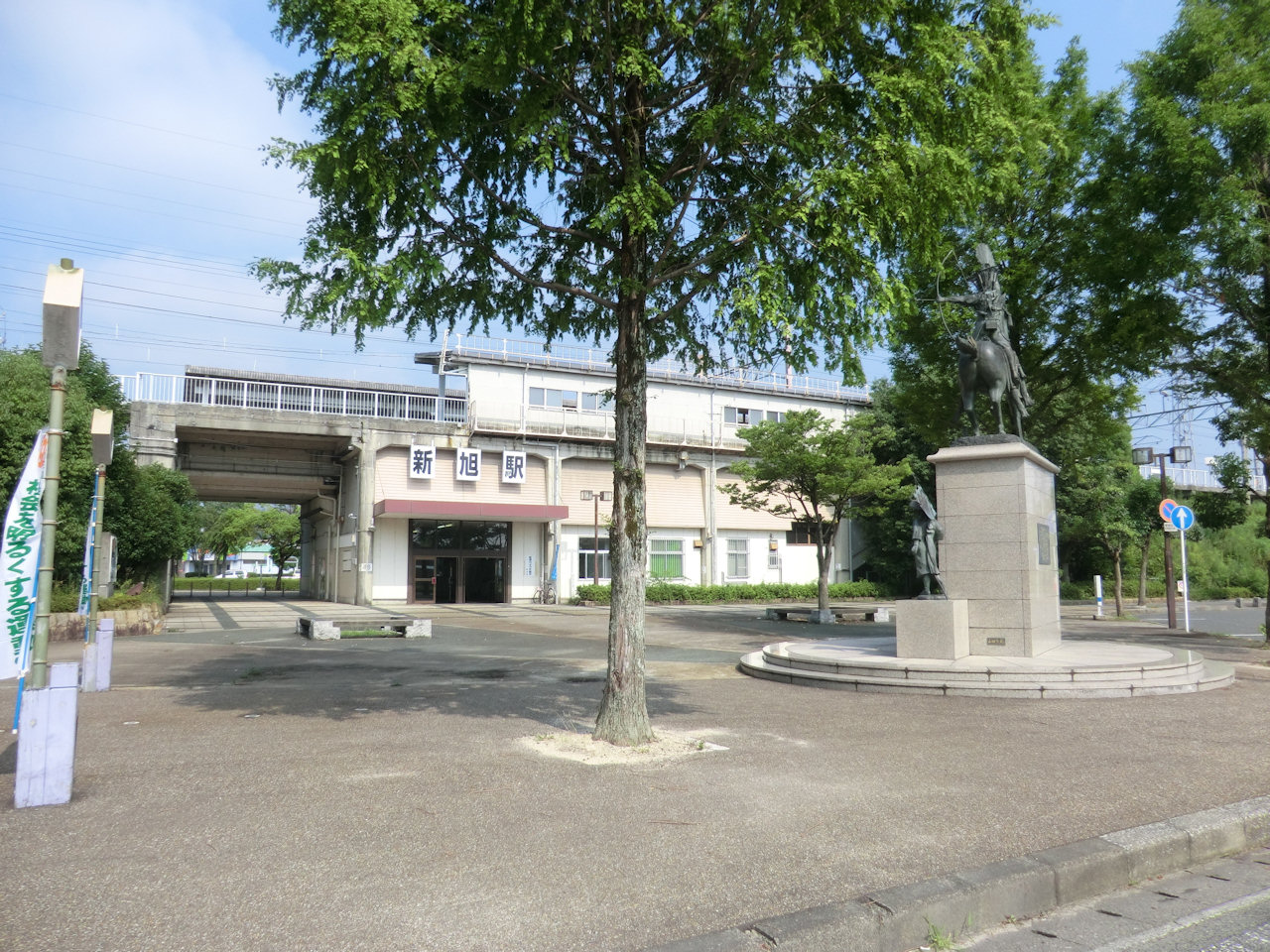 新旭駅